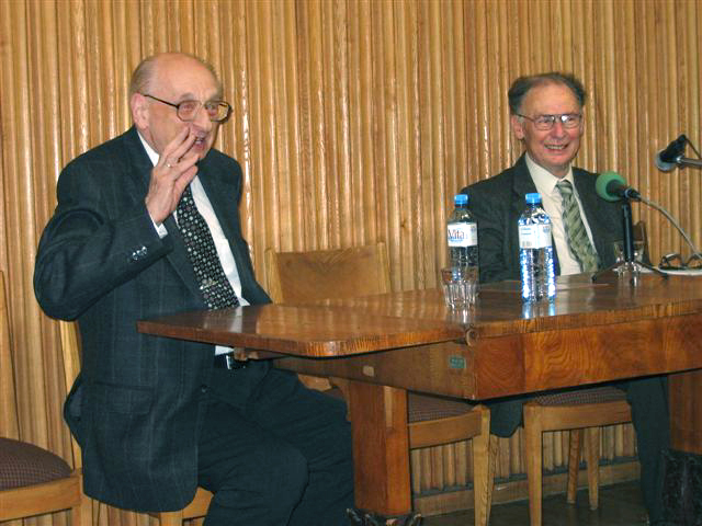 Władysław Bartoszewski (Warsaw, 19.02.1922, - Warsaw, 24.4.2015), Polish historian, publicist, writer and diplomat and Michał Głowiński (b. 1934), Polish historian of literature and essayist